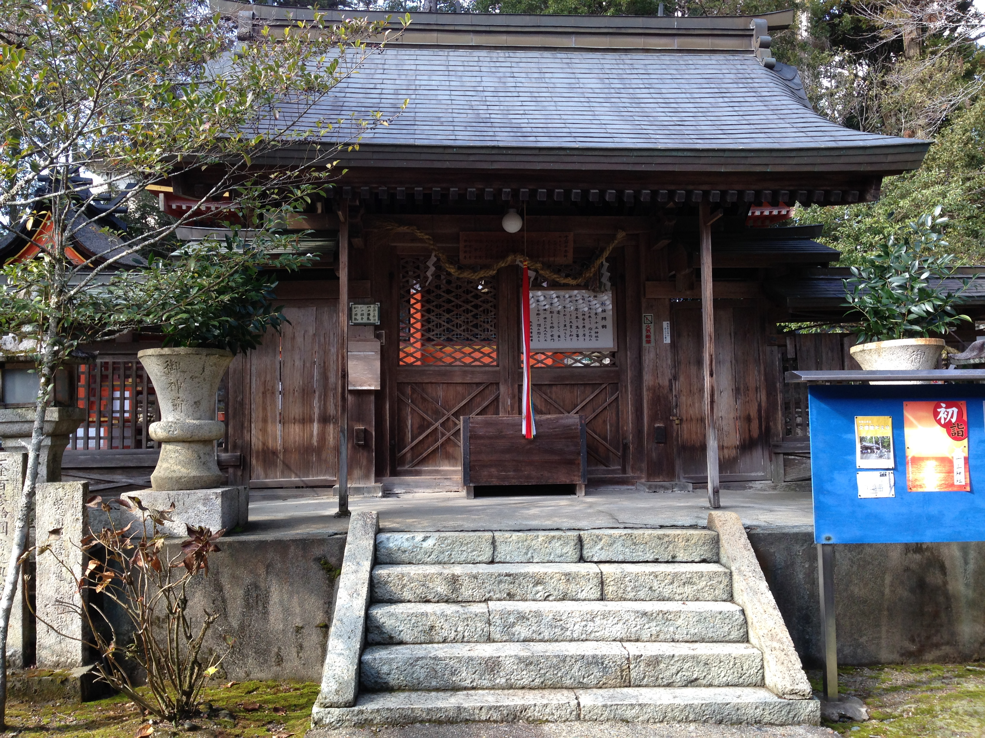 十三神社の鈴門（礼拝場所）。この先には本殿があるが、関係者以外立ち入ることができない。